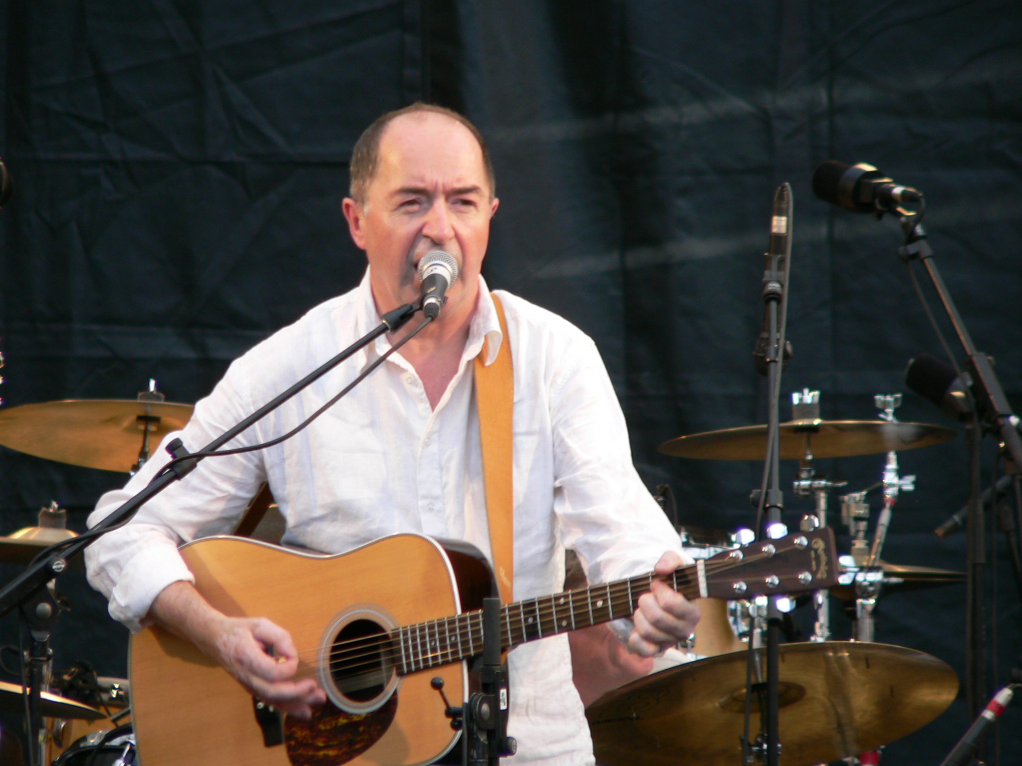 Niels Skousen - Live på Amphiscenen ved Brandts Klædefabrik, Odense, 19. juni 2005